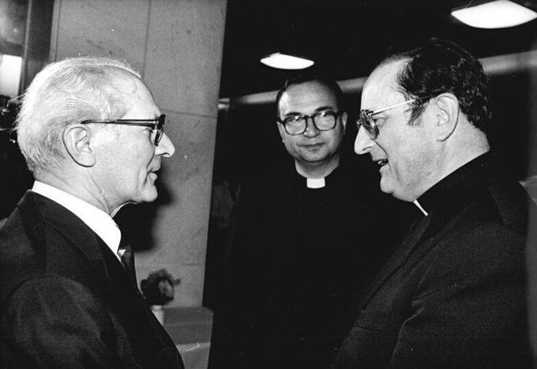 ADN-ZB Mittelstädt 23.10.1987 Berlin: Jubiläum-Staatsakt. Vor Beginn des Staatsakts traf der Generalsekretär des ZK der SED und Vorsitzenden des Staatsrates der DDR, Erich Honecker, mit dem Vorsitzenden der Berliner Bischofskonferenz, Kardinal Joachim Meisner (r.), Bischof des Bistums Berlin, zusammen.